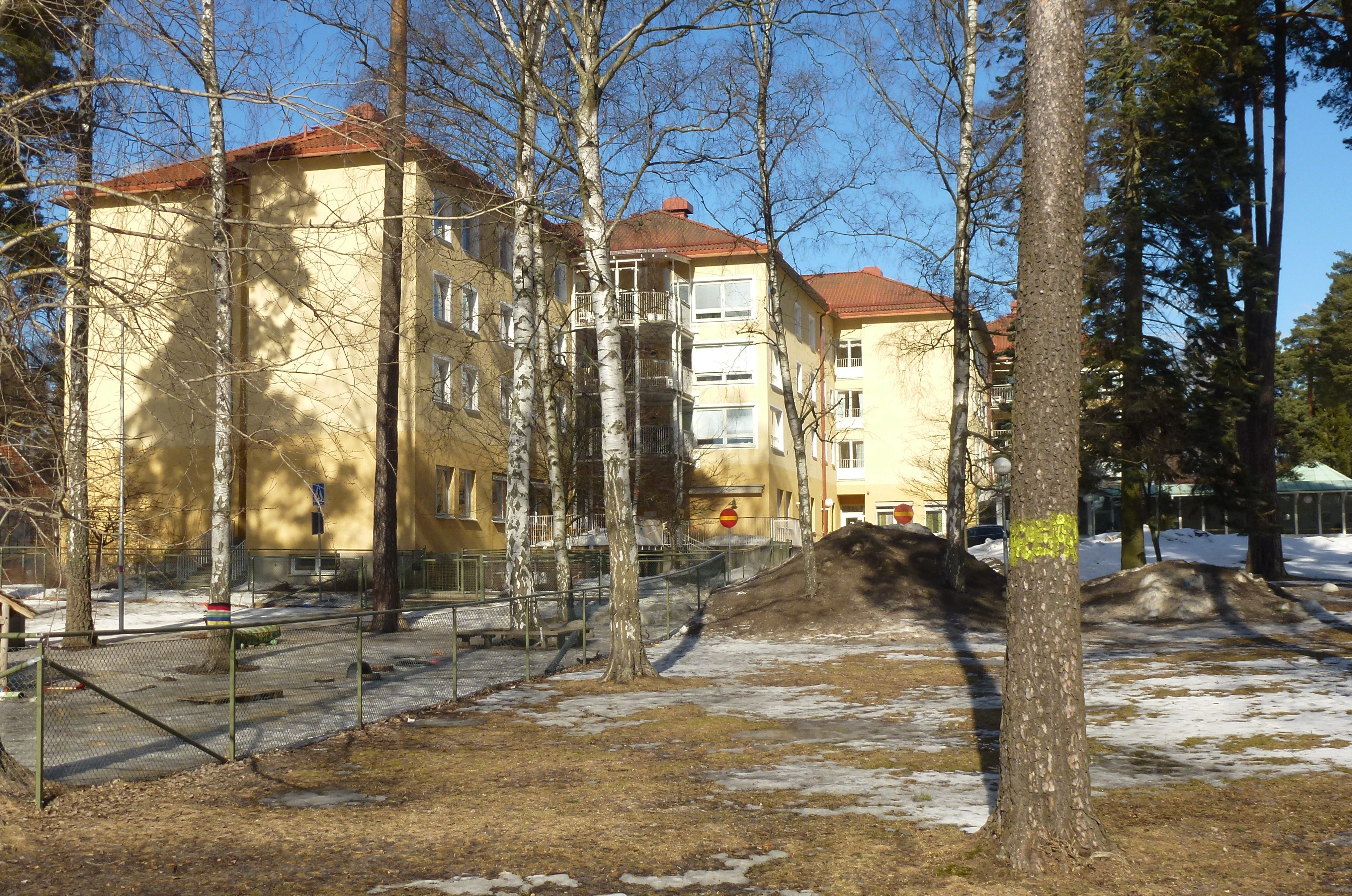 Hemmet för gamla, hus A, arkitekter Ture Ryberg och Carl-Erik Forssén